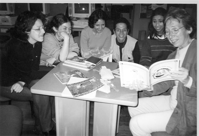 Geneviève Patte, en la Biblioteca el Parque, Bogota, Colombia 2002